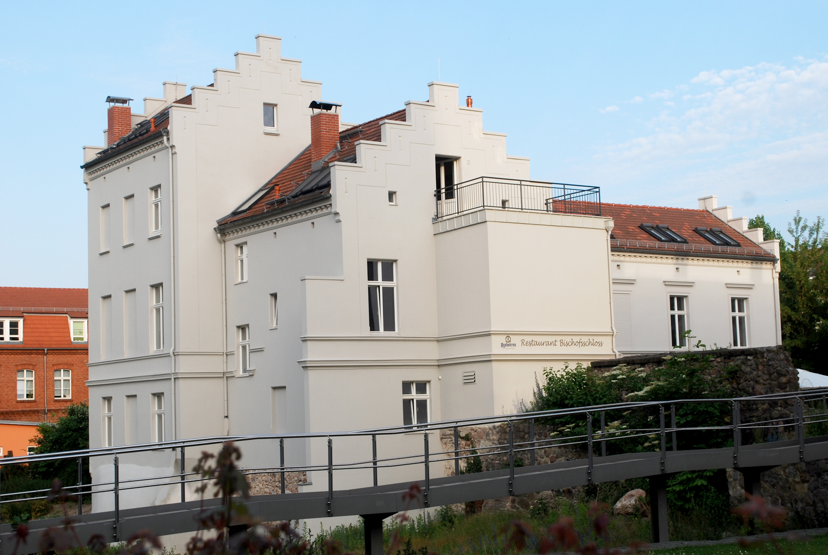 Frisch renoviertes Bischofsschloss am Domplatz